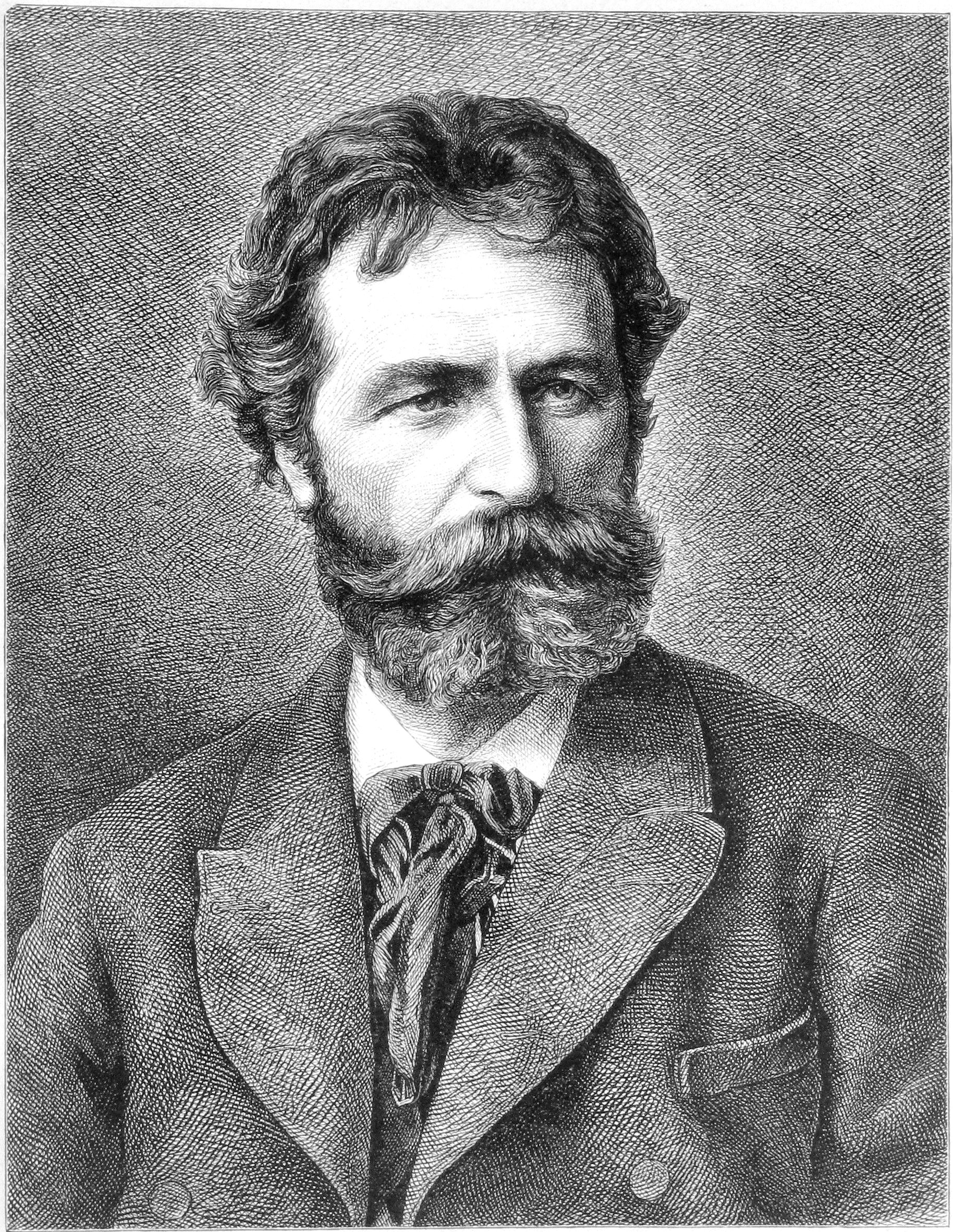 Portrait de Franz Defregger par Adolf Neumann